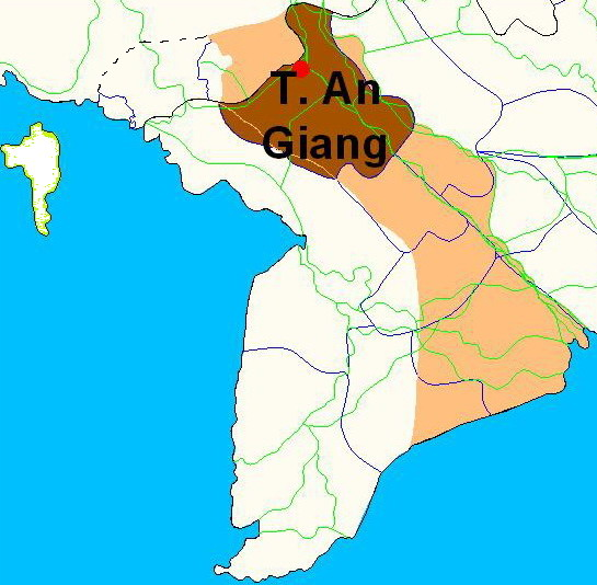 Địa giới tỉnh An Giang nhà Nguyễn (giai đoạn 1832-1867) so với địa giới tỉnh An Giang ngày nay.